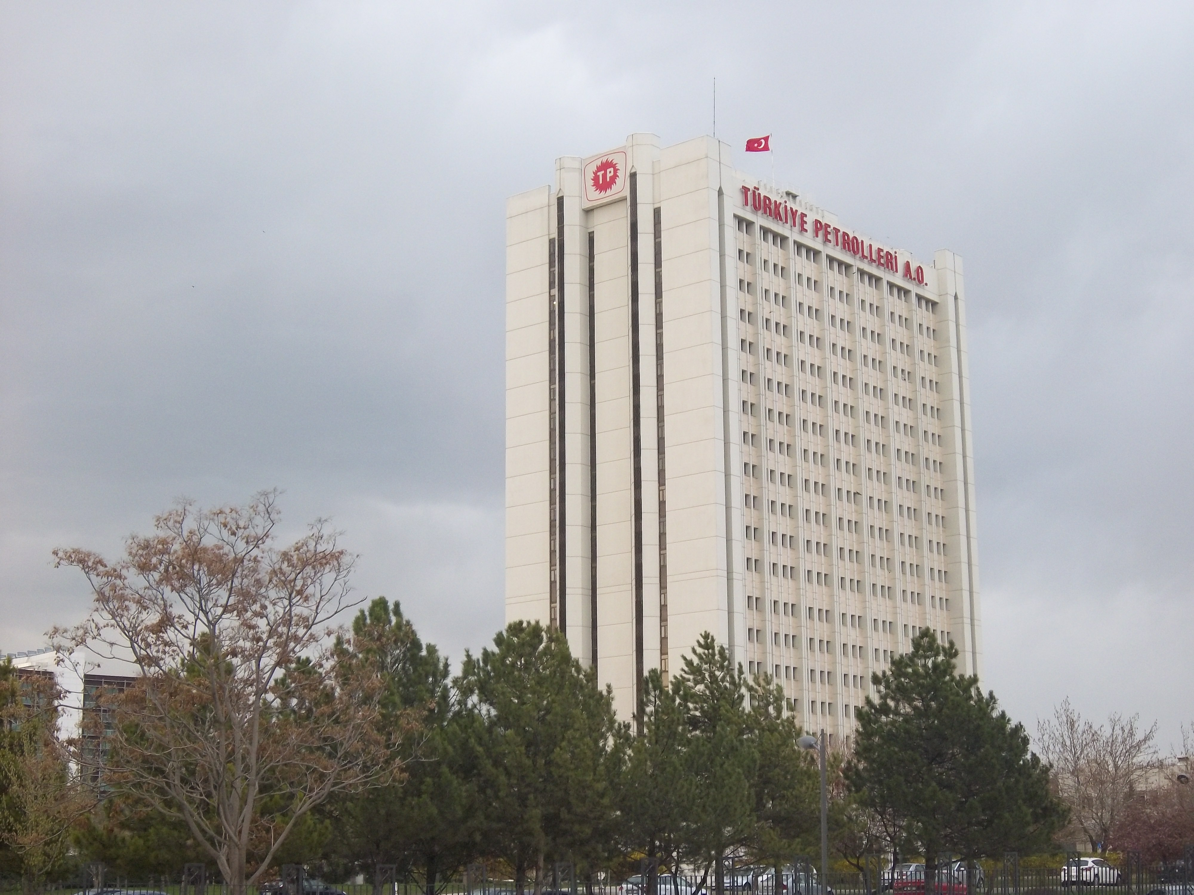 Српски (ћирилица): Зграда националне нафтне компаније Републике Турске у Анкари.